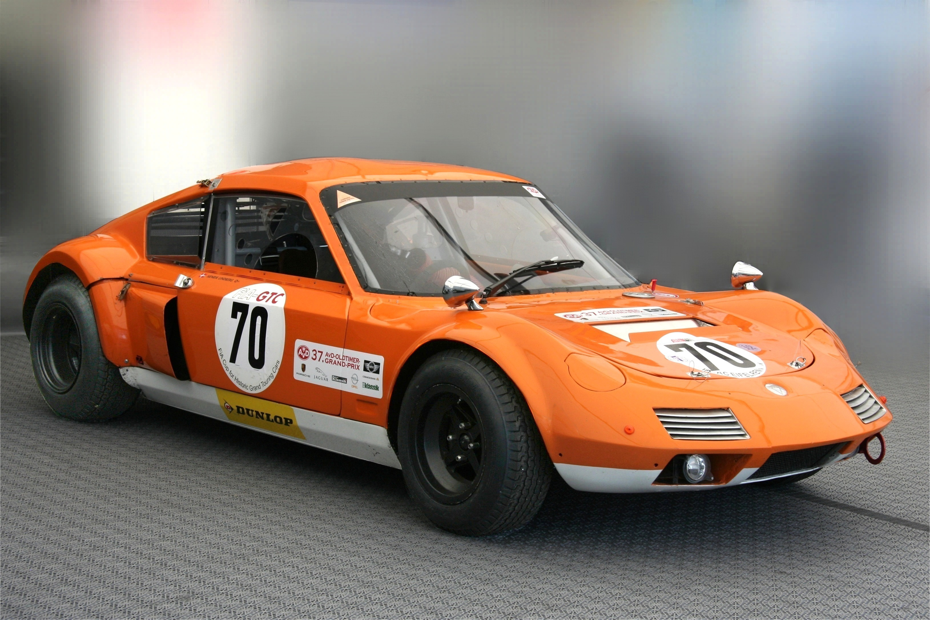 Elva 160 beim Oldtimer-Grand-Prix 2009 am Nürburgring